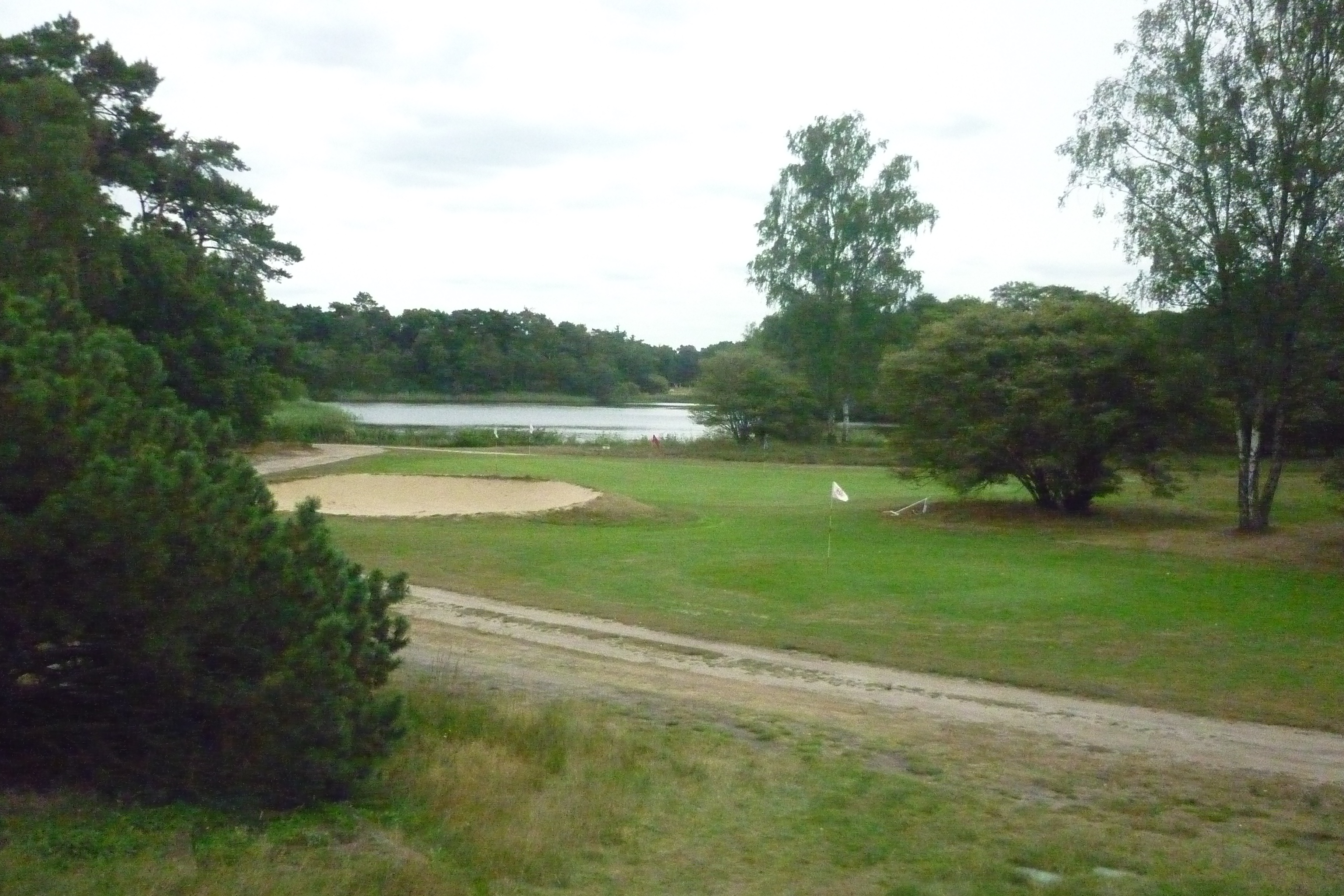 Eindhovensche Golf oefenterrein en vennetje